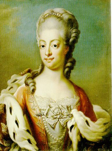 Sophia Magdalena von Dänemark, Königin von Schweden Sofia Maddalena principessa di Danimarca regina di Svezia 1788 Jacob Björck